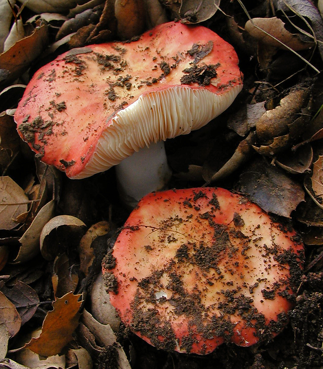 Russula maculata Quél. & Roze